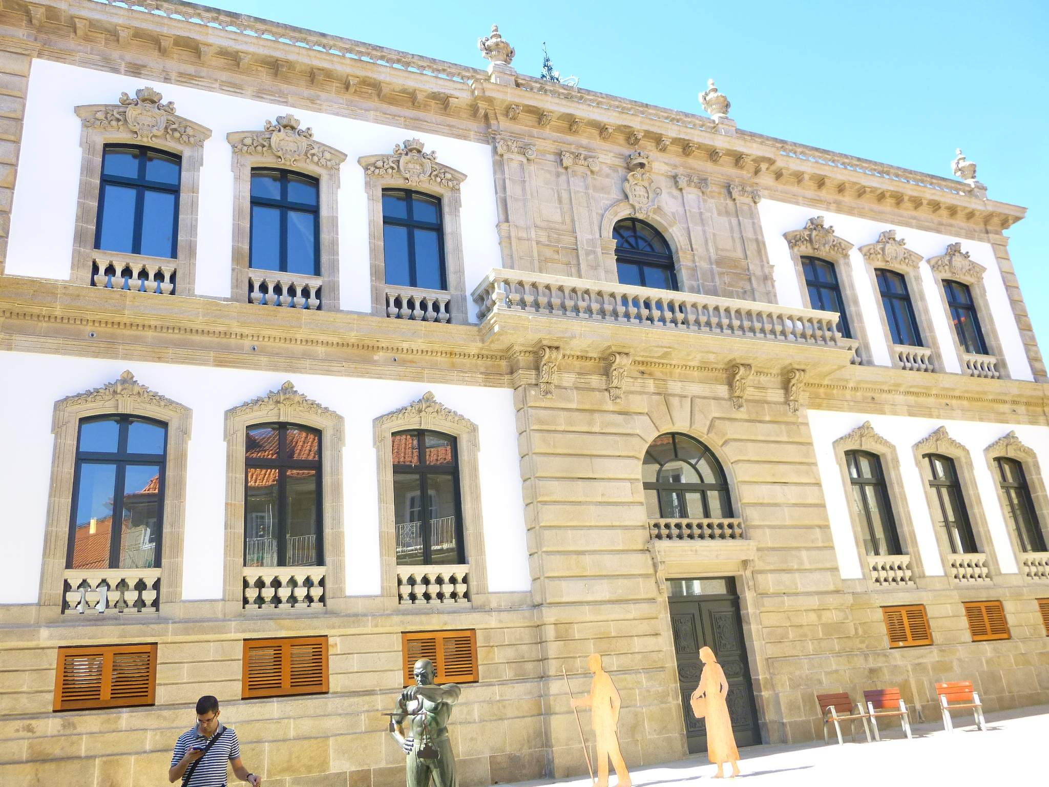 Pontevedra - Casa Consistorial (Ayuntamiento)